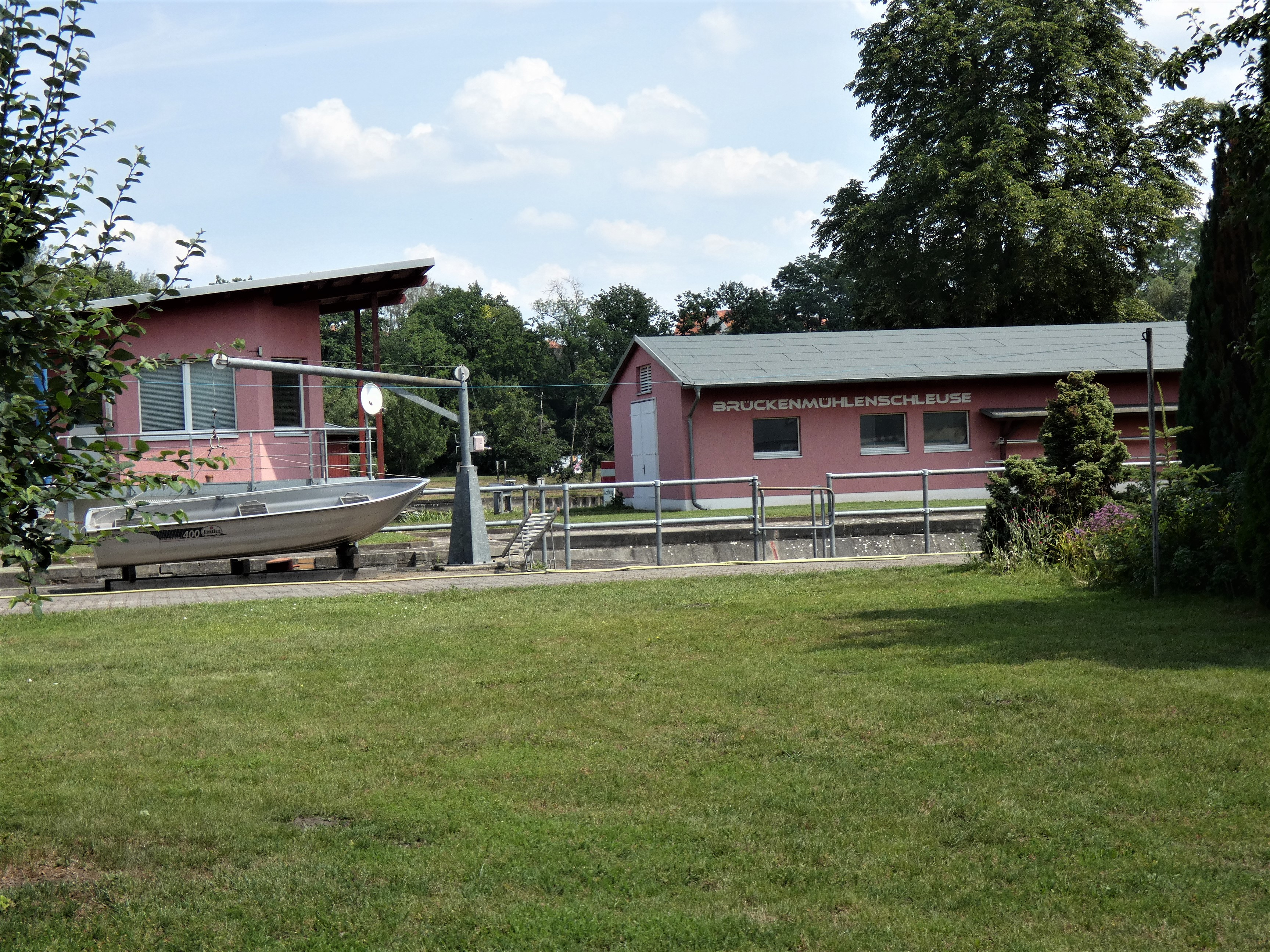 Brückenmühlenschleuse, An der Schleuse 5, Weißenfels